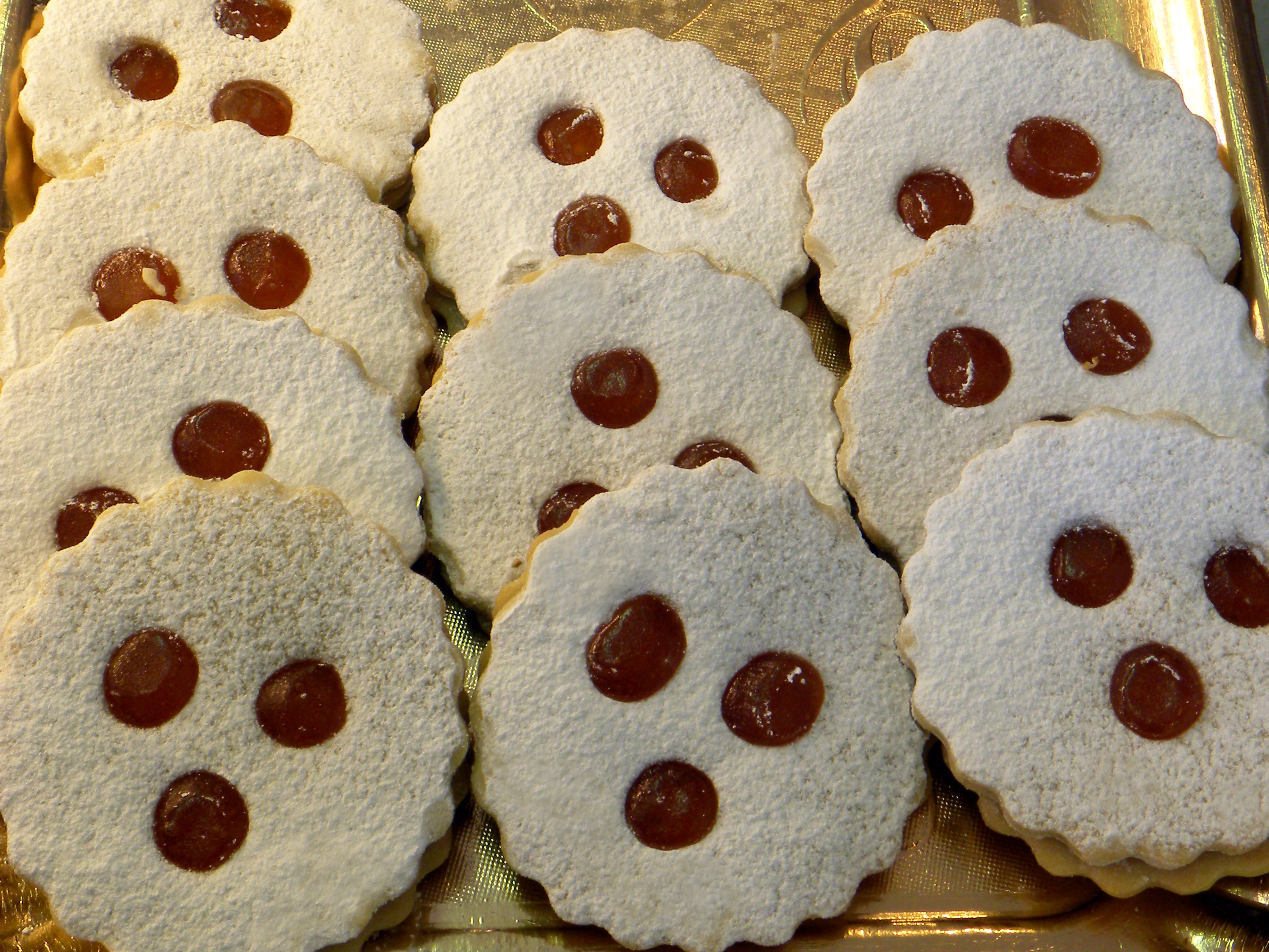 Linzer Augen der Bäckerei Schwarz, Filiale Herbststraße